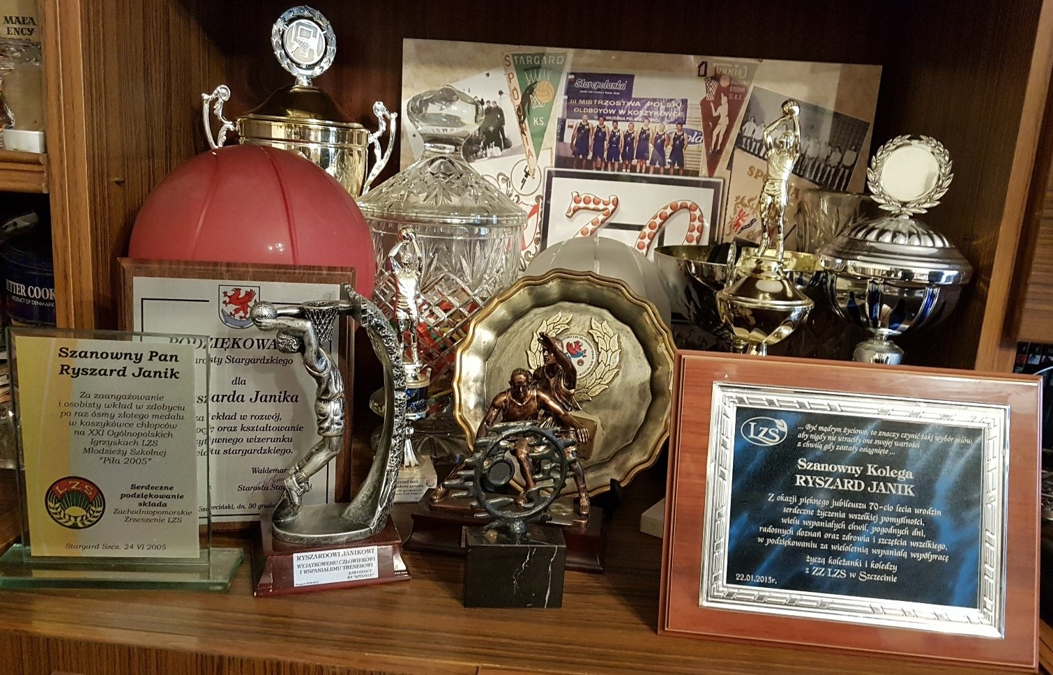 Pamiątki trenera Spójni Ryszarda Janika